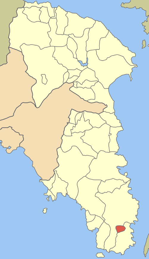 Locator map of Agios Konstandinos community (Κοινότητα Αγίου Κωνσταντίνου) in East Attica Nomarchia (Νομαρχία Ανατολικής Αττικής) in Greece.